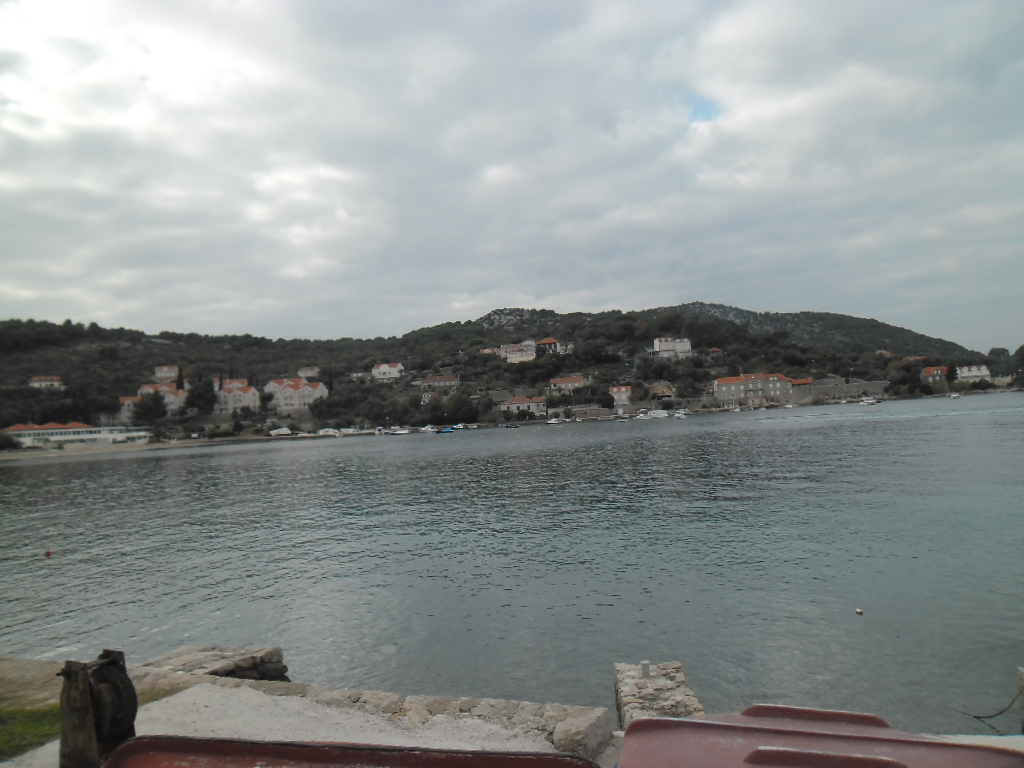 Donje Čelo na otoku Koločepu